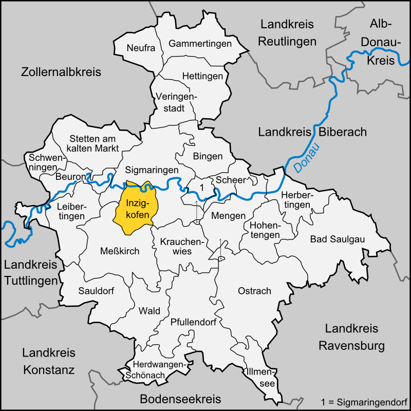 Karte der Gemeinde Inzigkofen im Landkreis Sigmaringen